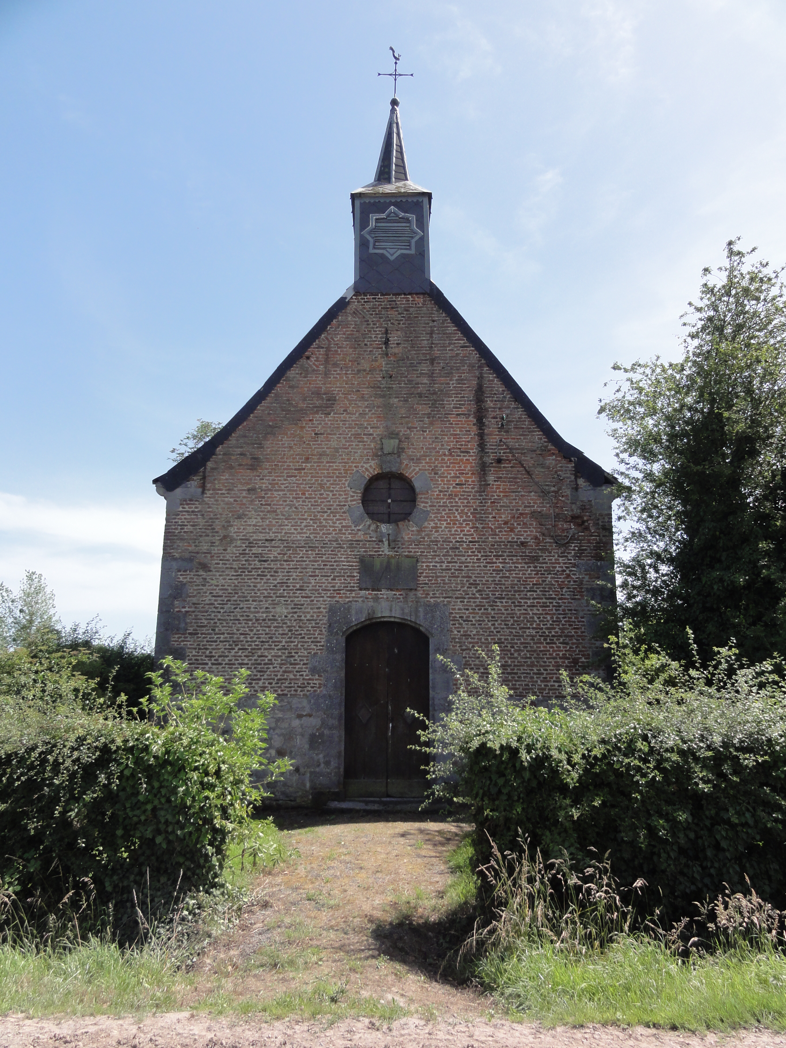 Bermeries (Nord, Fr) chapelle N.D. de Lourdes, face à la ferme Cambron This building is indexed in the Base Mérimée, a database of architectural heritage maintained by the French Ministry of Culture, under the references PA00107376 and type .